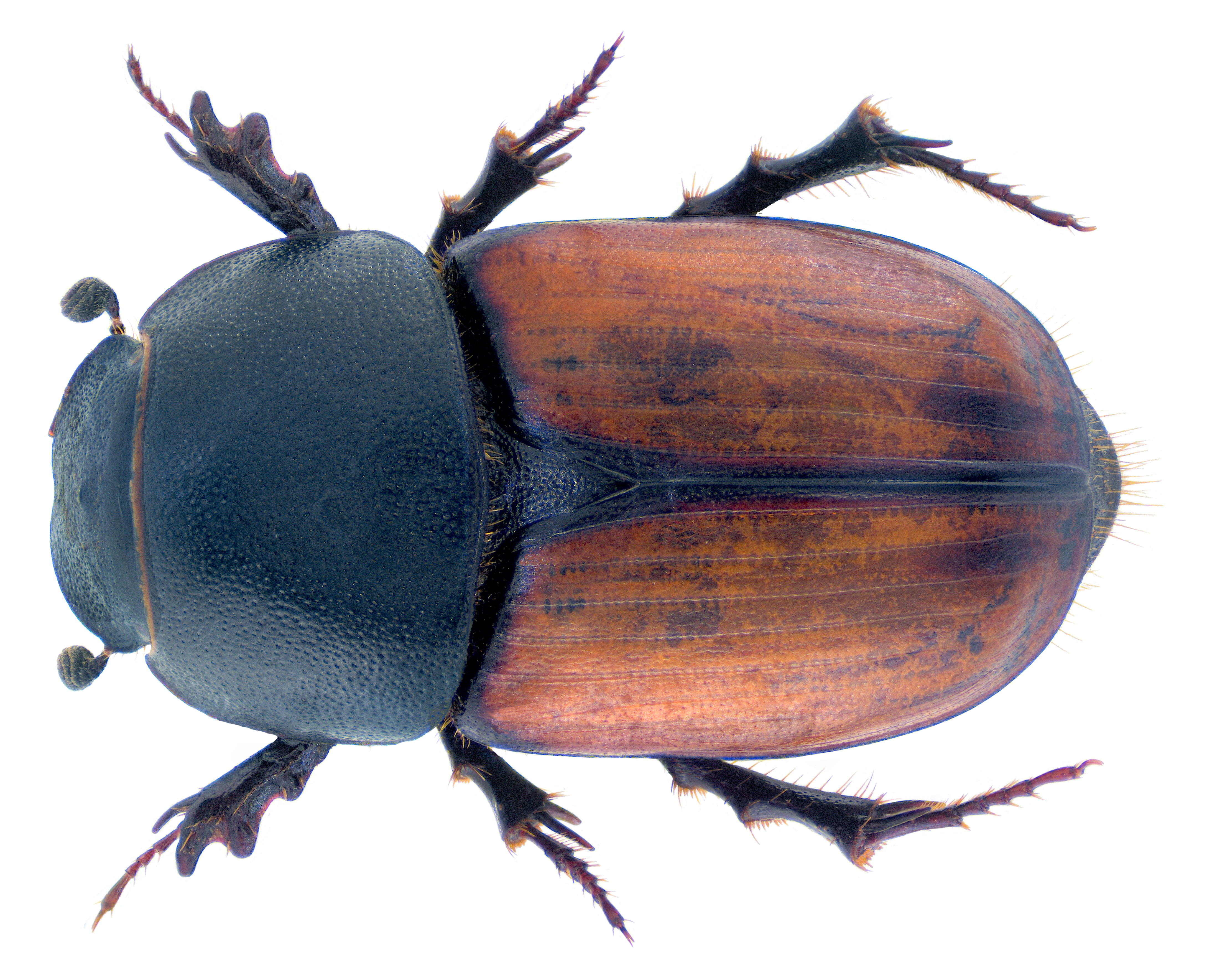 Family: Scarabaeidae (Aphodiidae, Aphodiinae) Size: 8.5 mm Location: Turkey, Ovit dagi, Rize leg.det. A.Bellerio, 18.VI.1992; Coll. J.Schoenfeld Photo: U.Schmidt, 2017